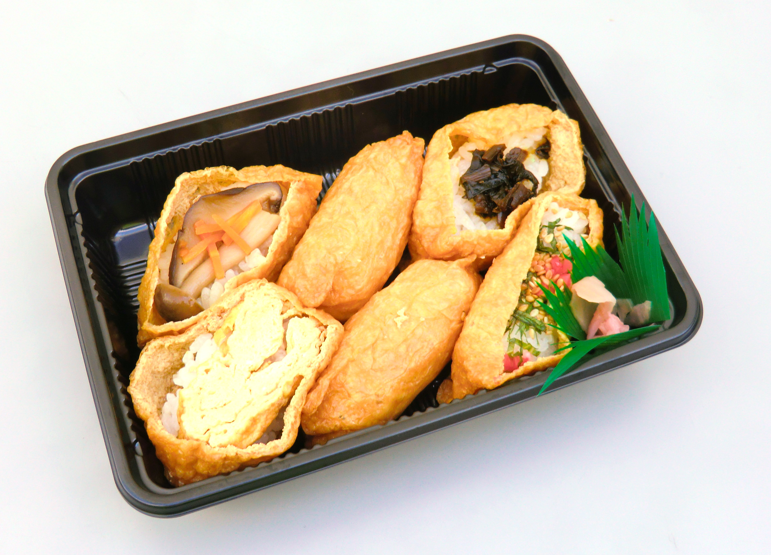 豊川いなり寿司の一例。葉わさび、出汁巻き玉子などが乗っている